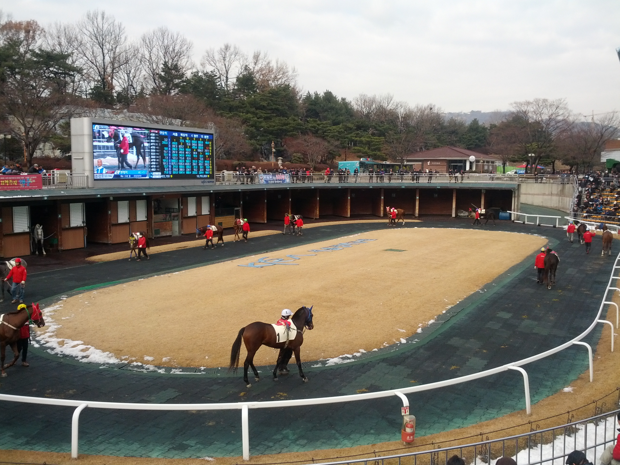 서울경마공원 예시장